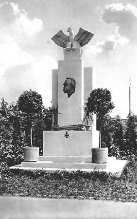 Pomnik Piłsudskiego w ogrodzie przy kasynie w Otwocku